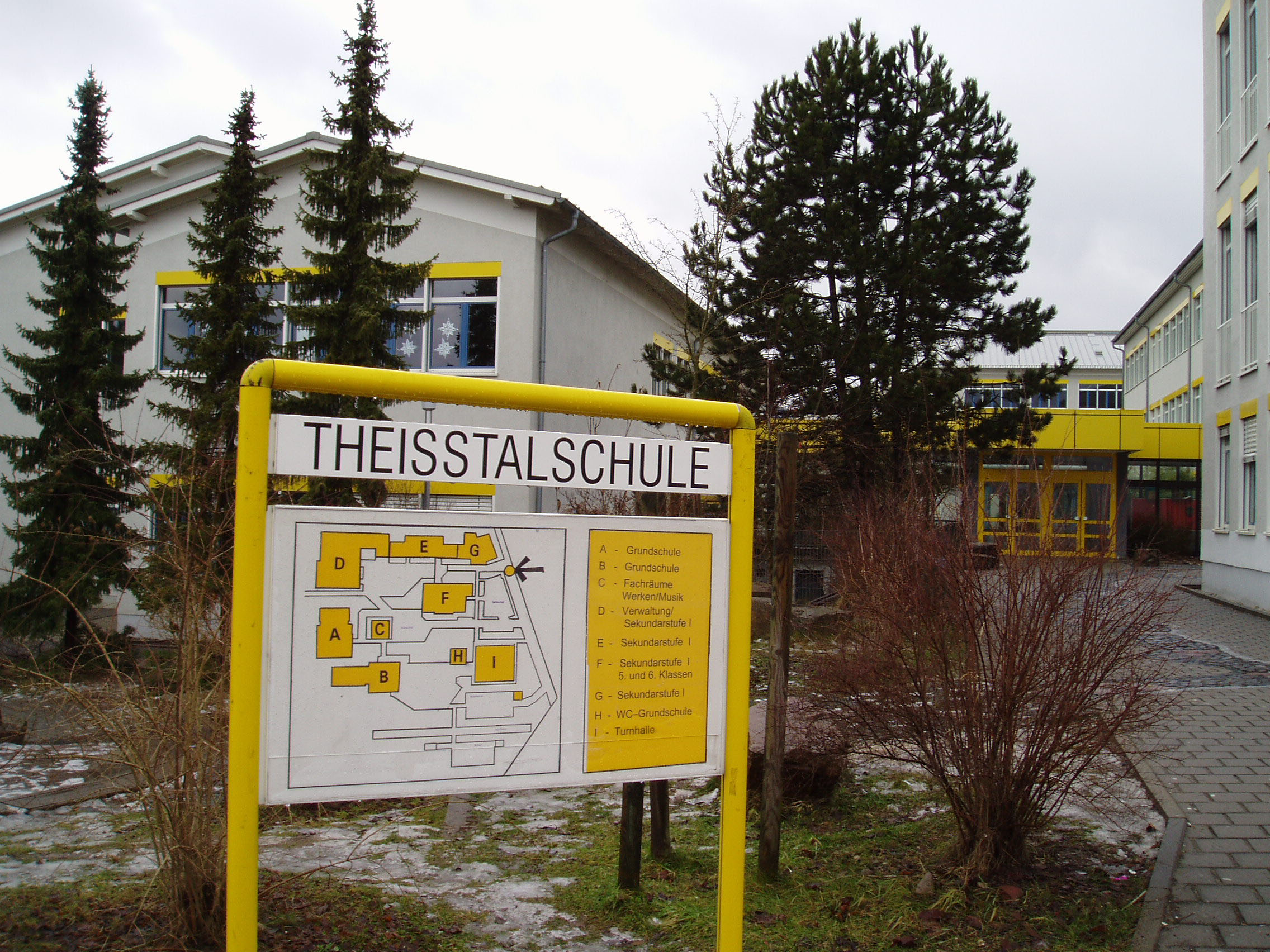 Theißtalschule in Niedernhausen im Taunus.